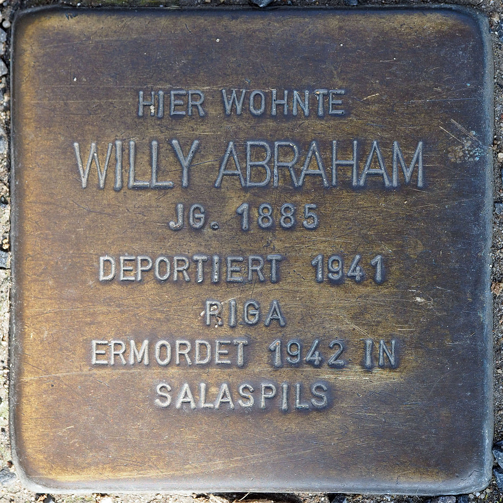 Stolpersteine MG: Abraham, Willy